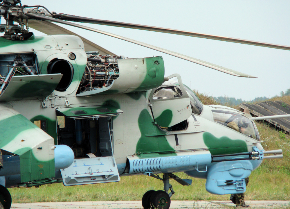 Мі-24П після участі у параді на День Незалежності у 2009 році на аеродромі Васильків